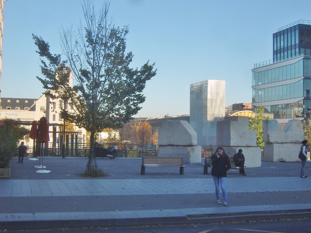 Paris 13e arrondissement - Place Robert-Antelme - vue vers l'est depuis l'avenue de France